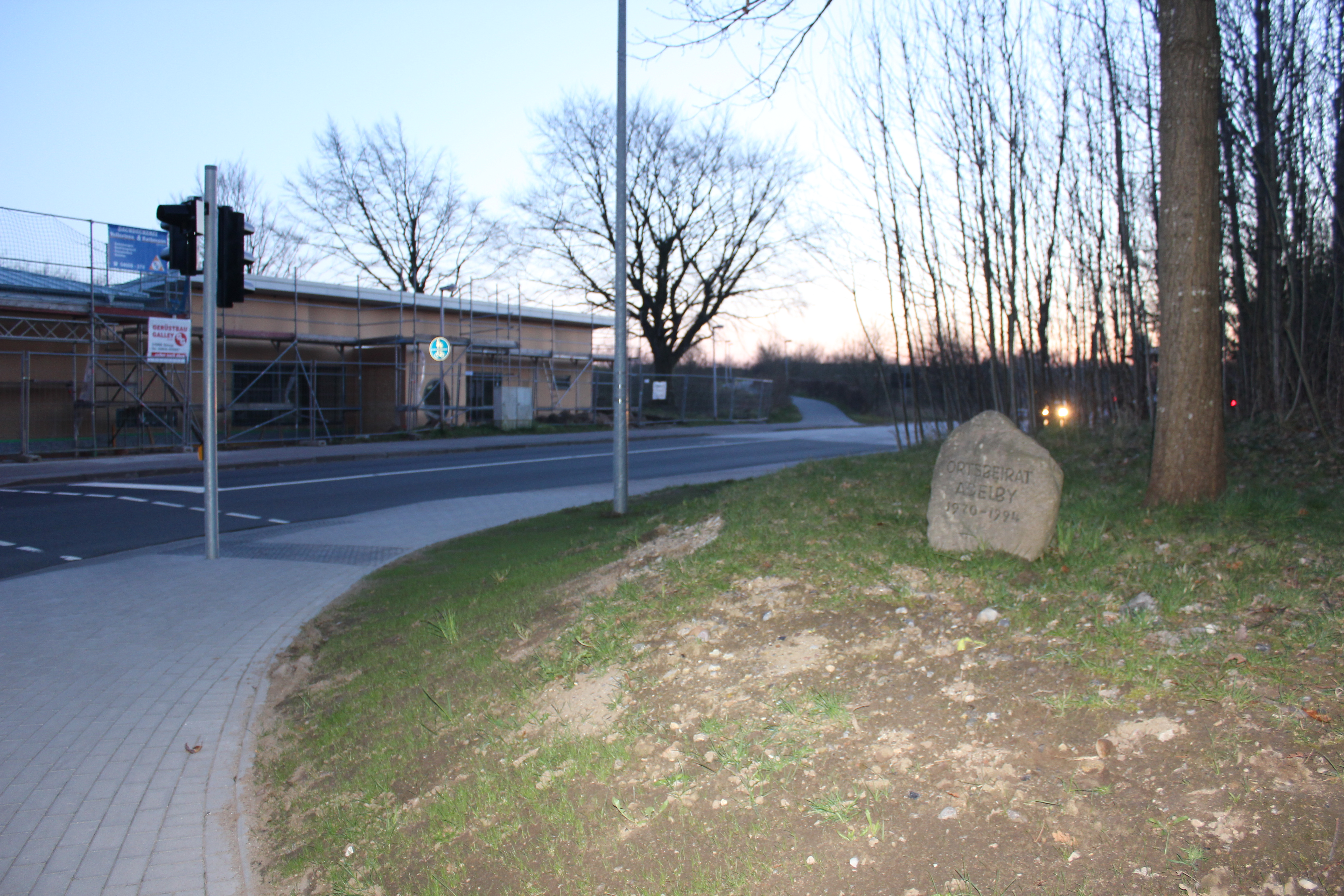 Gedenkstein Ortsbeirat Adelby, 1970-1994, Bild 03; Kreuzung der: Richard-Wagner-Straße, Ringstraße, Adelbylund, Taruper Hauptstraße; Gedenkstein zum Ortsbeirat von Adelby im Flensburger Rathaus in den Jahren 1970-1994 sowie im Hintergrund die im Bau befindliche Kinderkrippe, wo sich zuvor die Gärtnerei Löwenberg befand. Foto vom März 2014